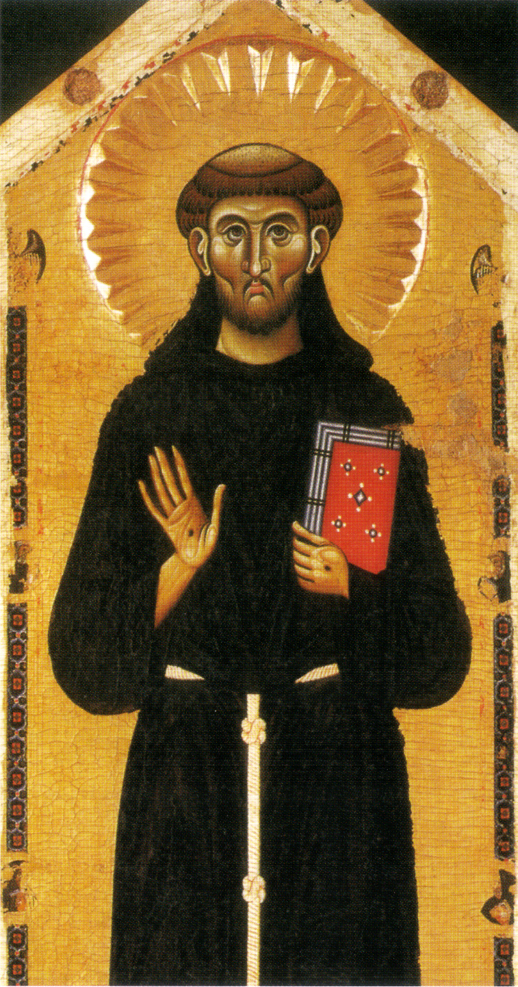 Maestro della croce 434 e maestro di santa maria primerana, san francesco e storie della sua vita (dettaglio), pistoia, museo civico